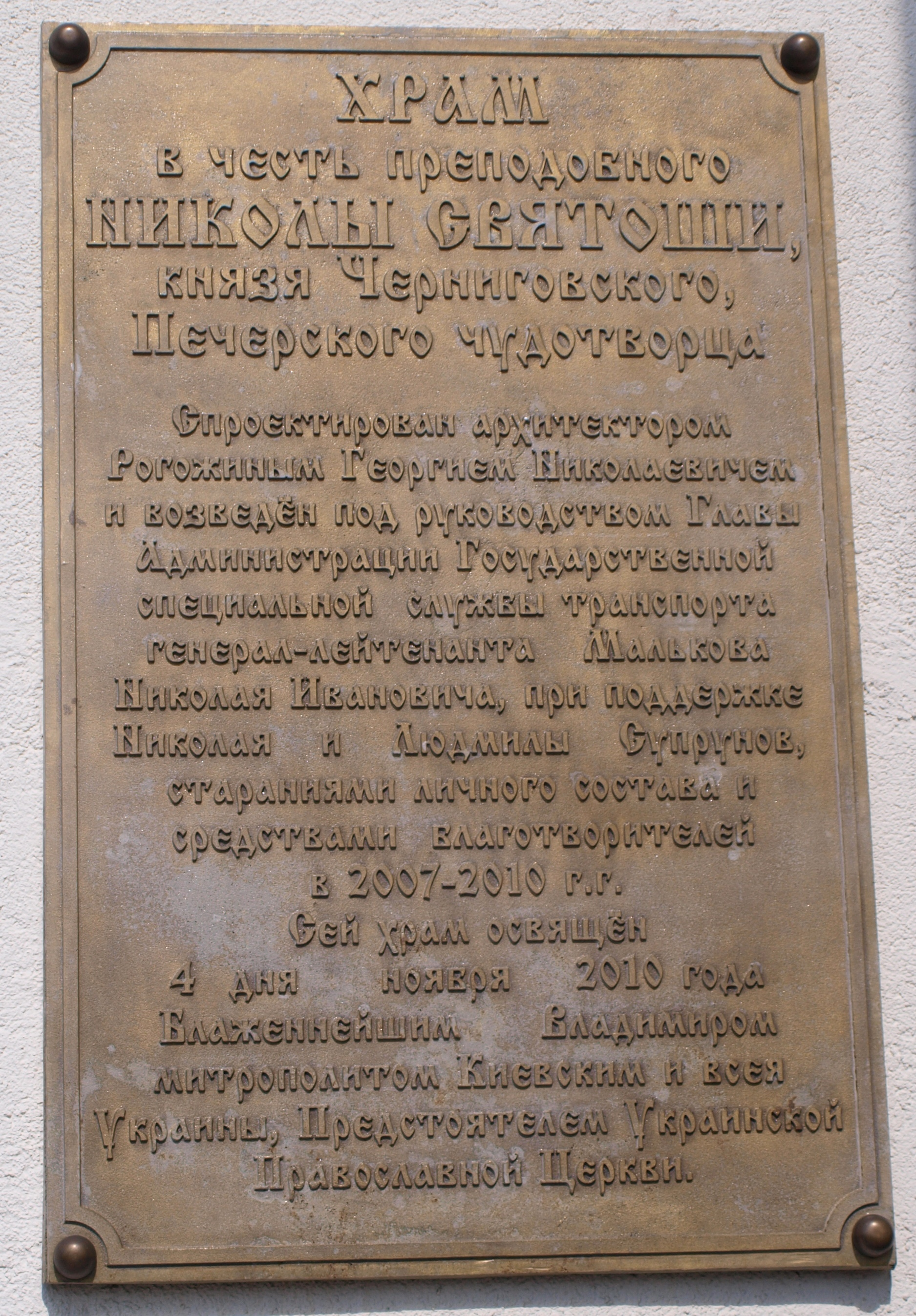 Храм Миколи Святоши (Київ)